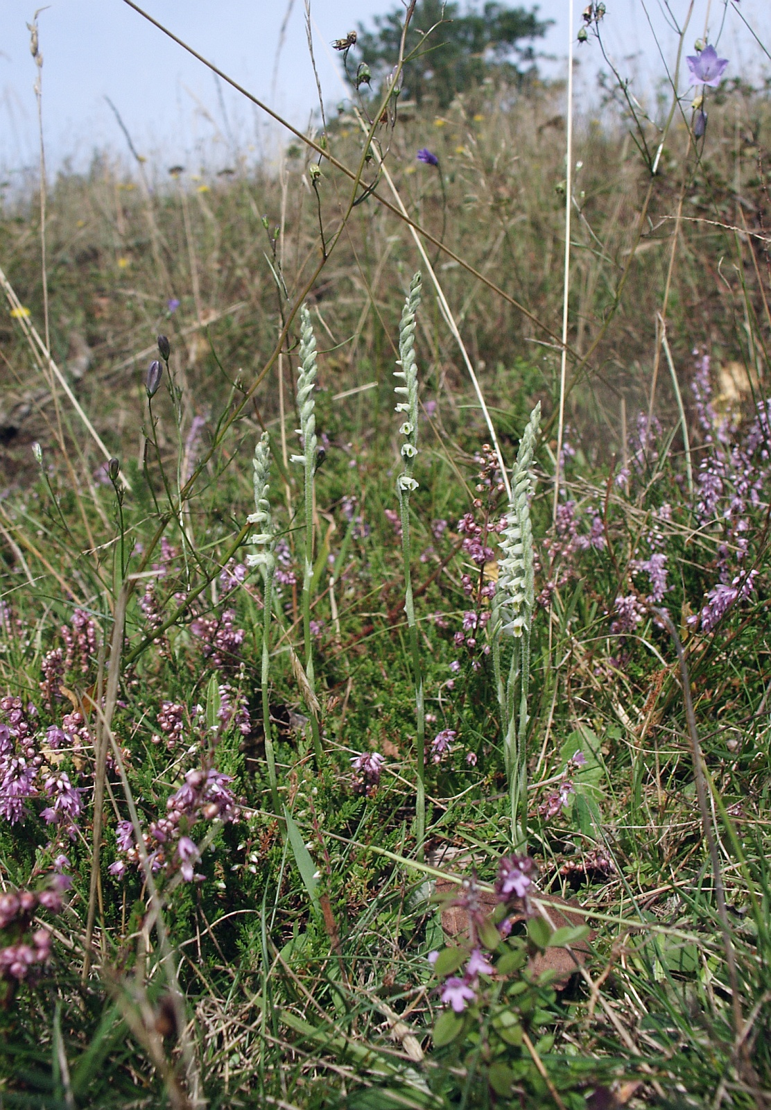 Spiranthes spiralis, Frankenhöhe, Germany